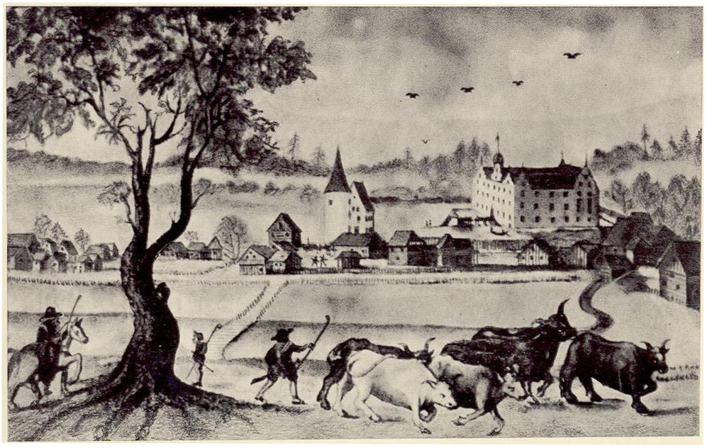 Dorfbach bei Ortenburg, Aquarell des Grafen Friedrich Casimirs